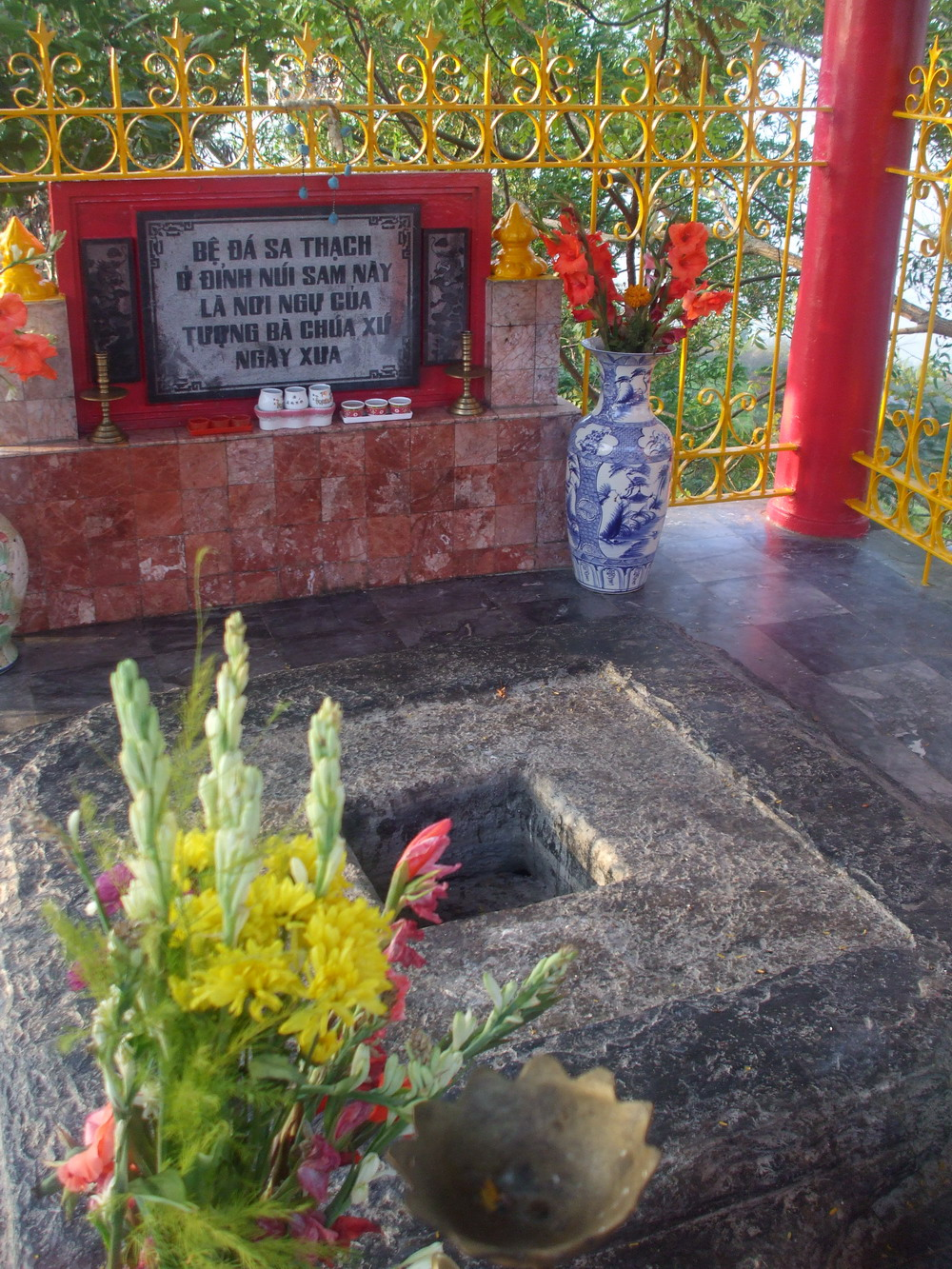 Trên đỉnh Núi Sam (Châu Đốc). Đây là nơi Bà Chúa Xứ Núi Sam ngự khi xưa.